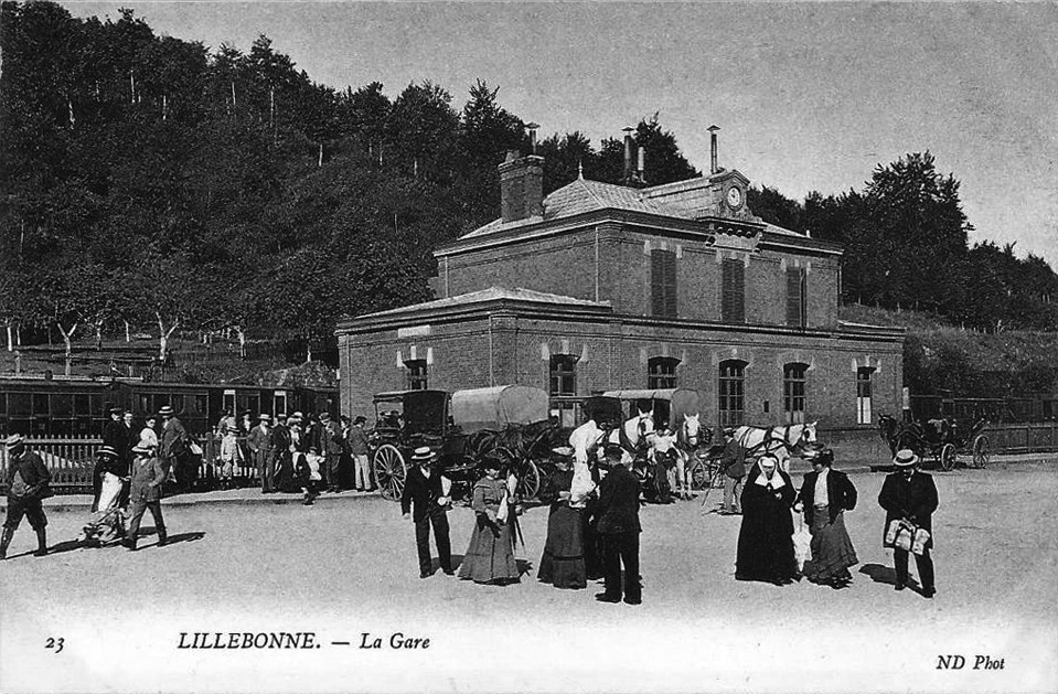 La gare de Lillebonne vers 1900. Depuis elle a été fermée et détruite.